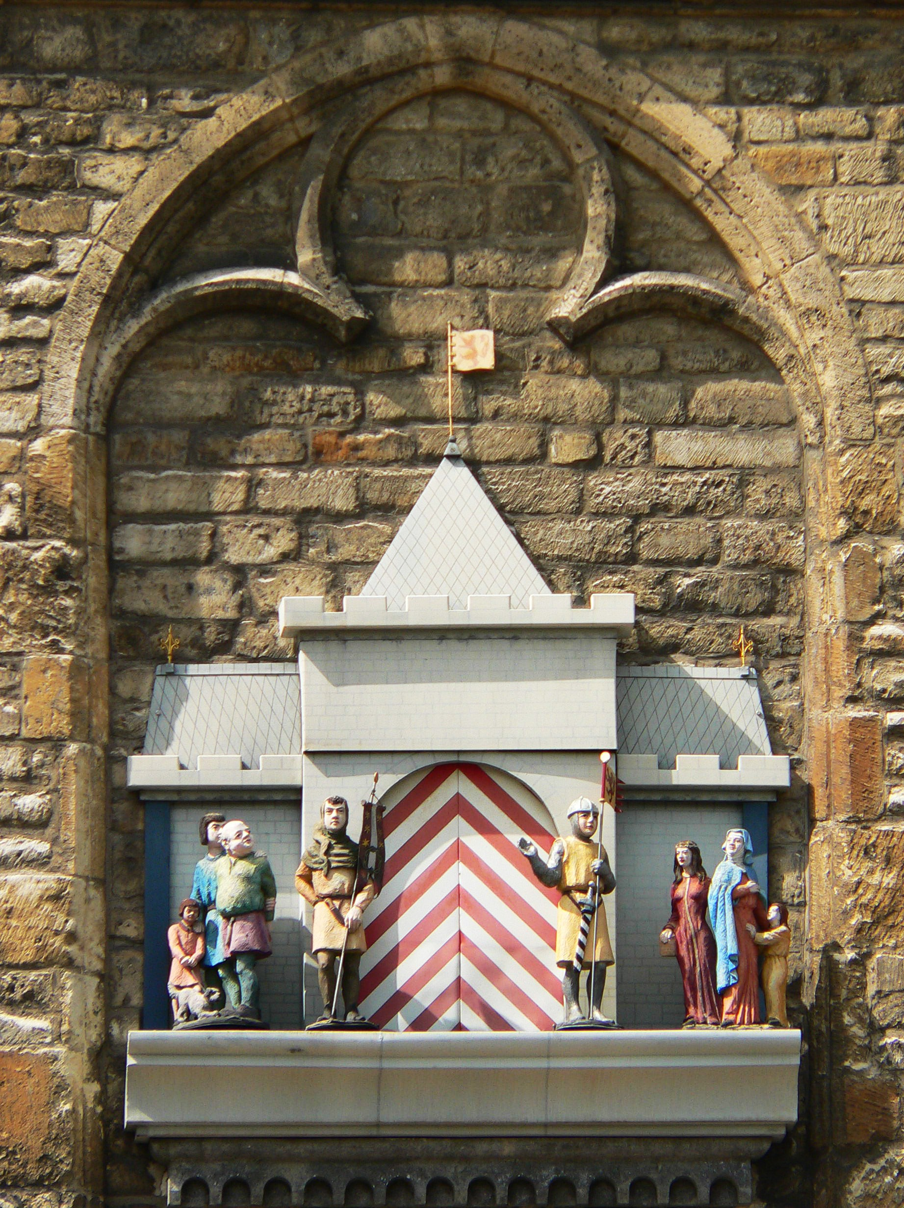 Das Puppenspiel unterhalb des Glockenspiels an der Ostseite (Südöstliche Ecke) am Rathaus von Gouda, Niederlande